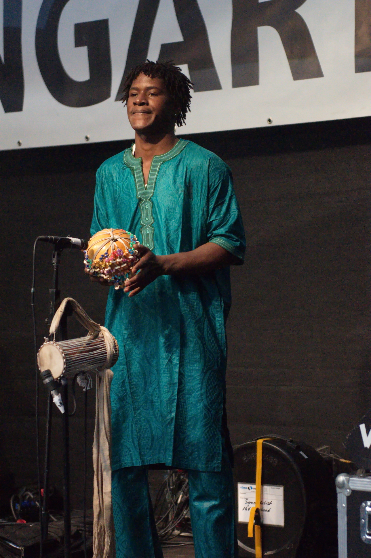 Open-Air-Konzert von Bassekou Kouyate & Ngoni ba; Tournee "Jama ko" im Skulpturenpark Waldfrieden, Wuppertal Bassekou Kouyaté: Ngoni Aminata Sacko: Gesang Mamadou Kouyate: Ngoni Bass Moustafa Kouyate: Ngoniba Mahamadou Tounkara: Yabara, Tama Abou Sissoko: Ngoni Moctar Kouyate: Calebasse